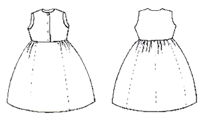 Саян — девичье платье без рукавов из чёрной самодельной сарпинки, обычно расшитое по швам позументом, поверх которого подвязывали холщовый «запон» (фартук). Одежда саян — этнографической группы русских.